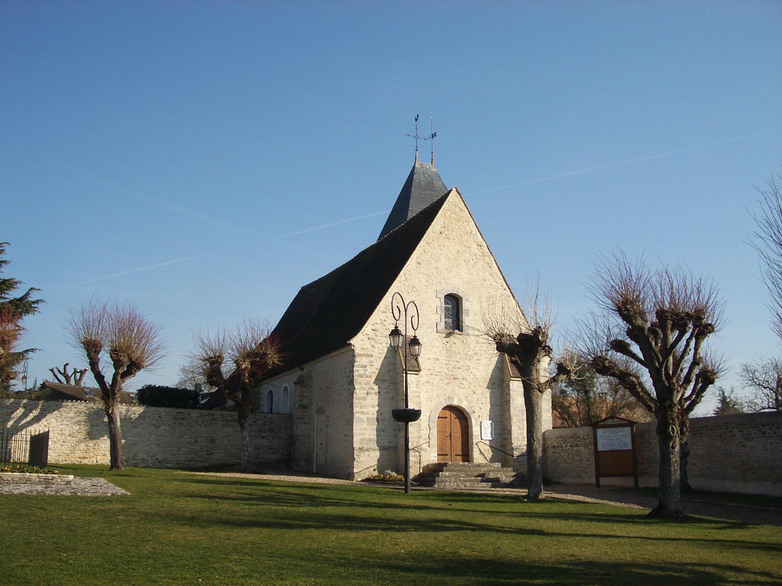 Église Saint-Martin de Bueil (Eure)